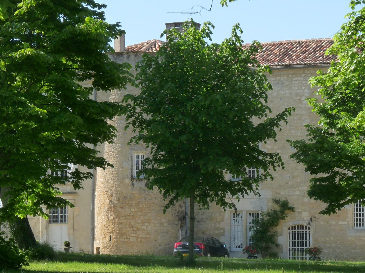 Château d'Ardenne, Charente, France